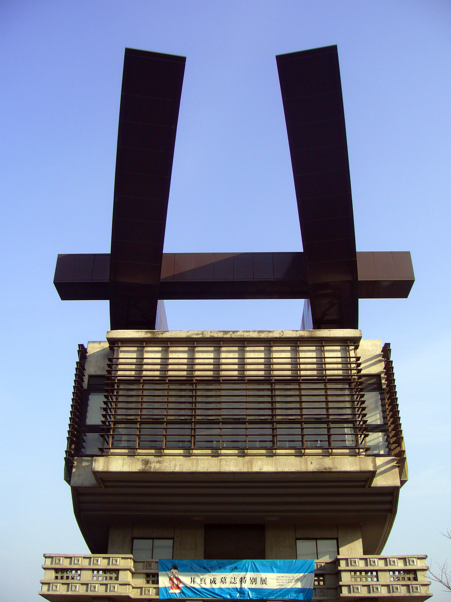 Aiserushura-hall in Fujiidera, Osaka, Japan